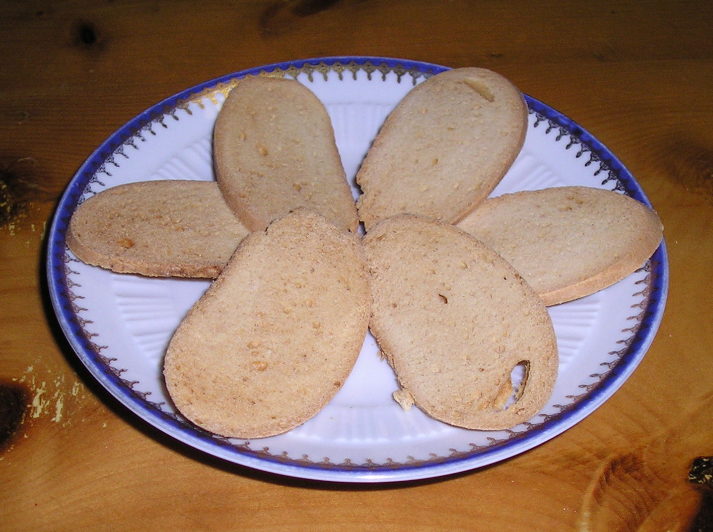 Baicoli, famous venetian biscuits